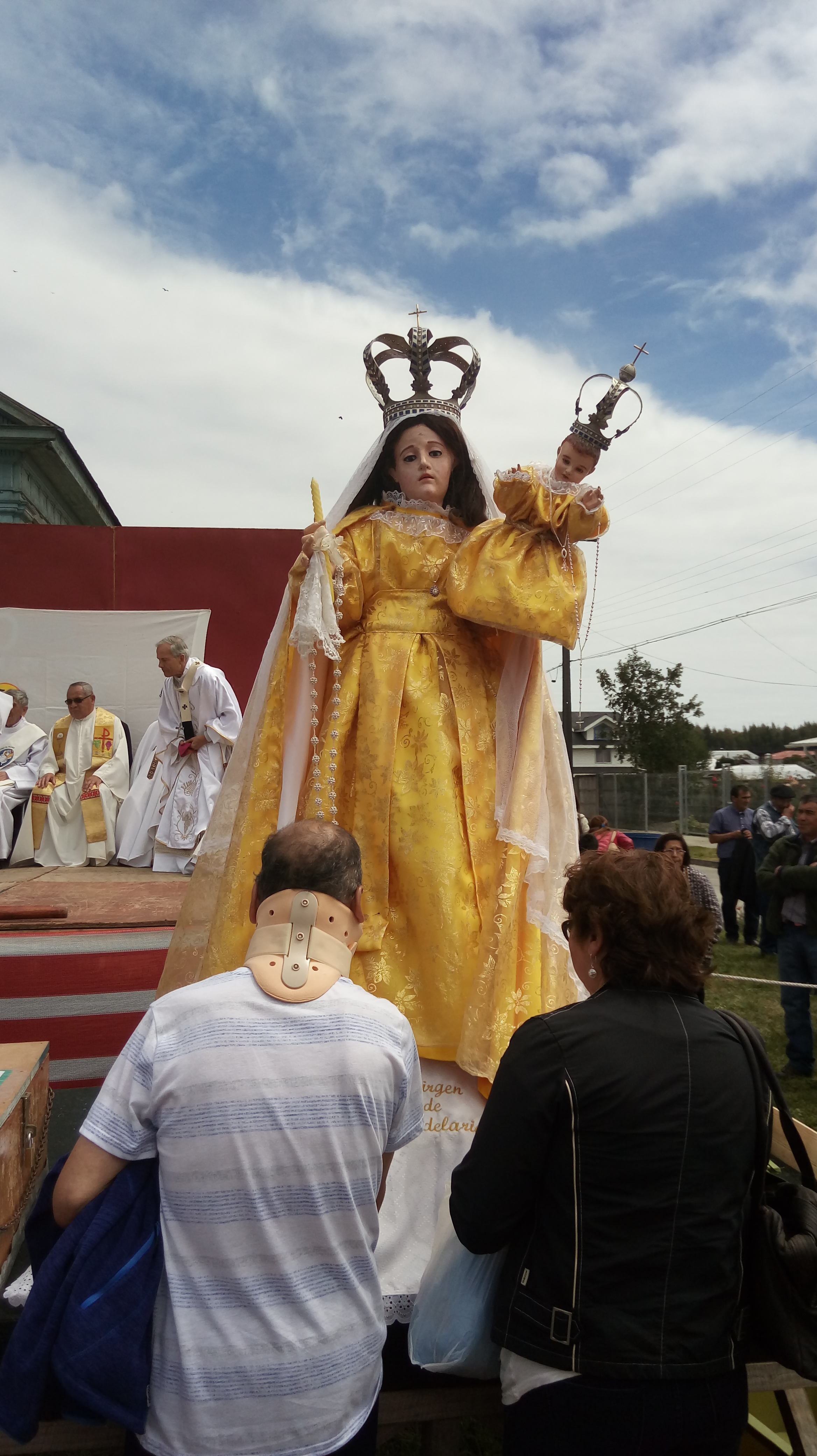 Imagen de Nuestra Señora de la Candelaria en su fiesta de 2017 en Carelmapu